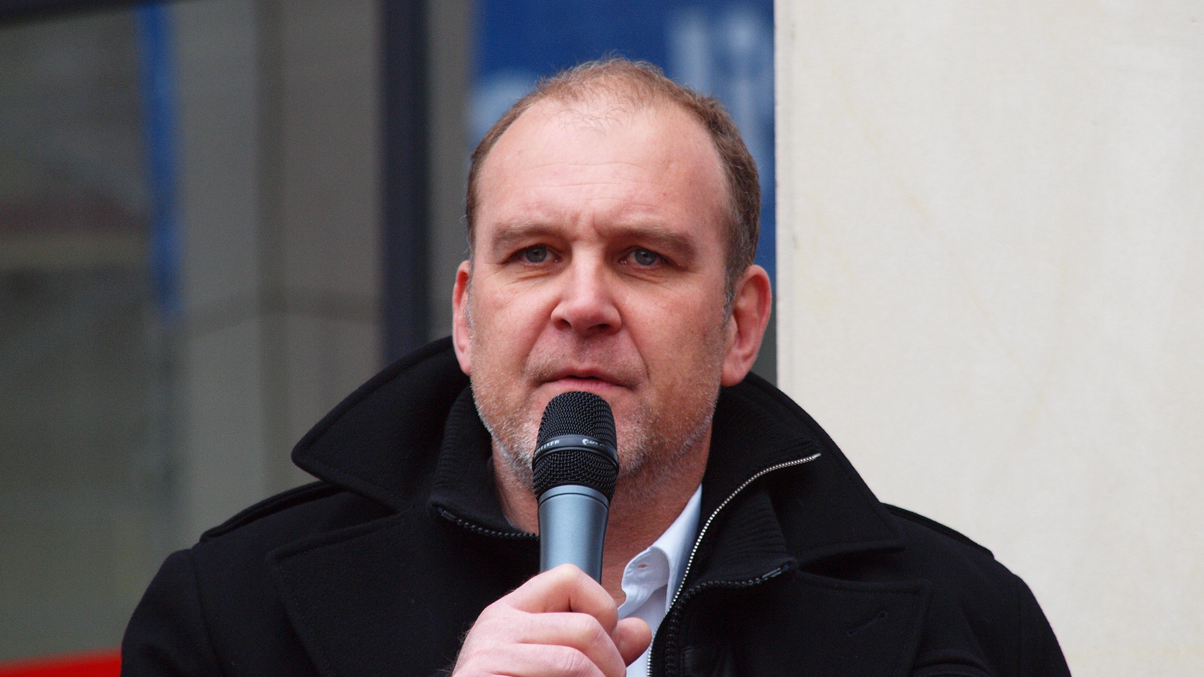 Erste FC Köln, Geschäftsführer Sport, Schmadtke, Jörg